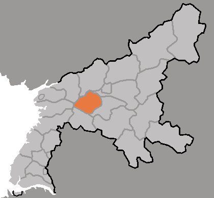 Map of sunchon, Pyongan-namdo, DPRK, 2006